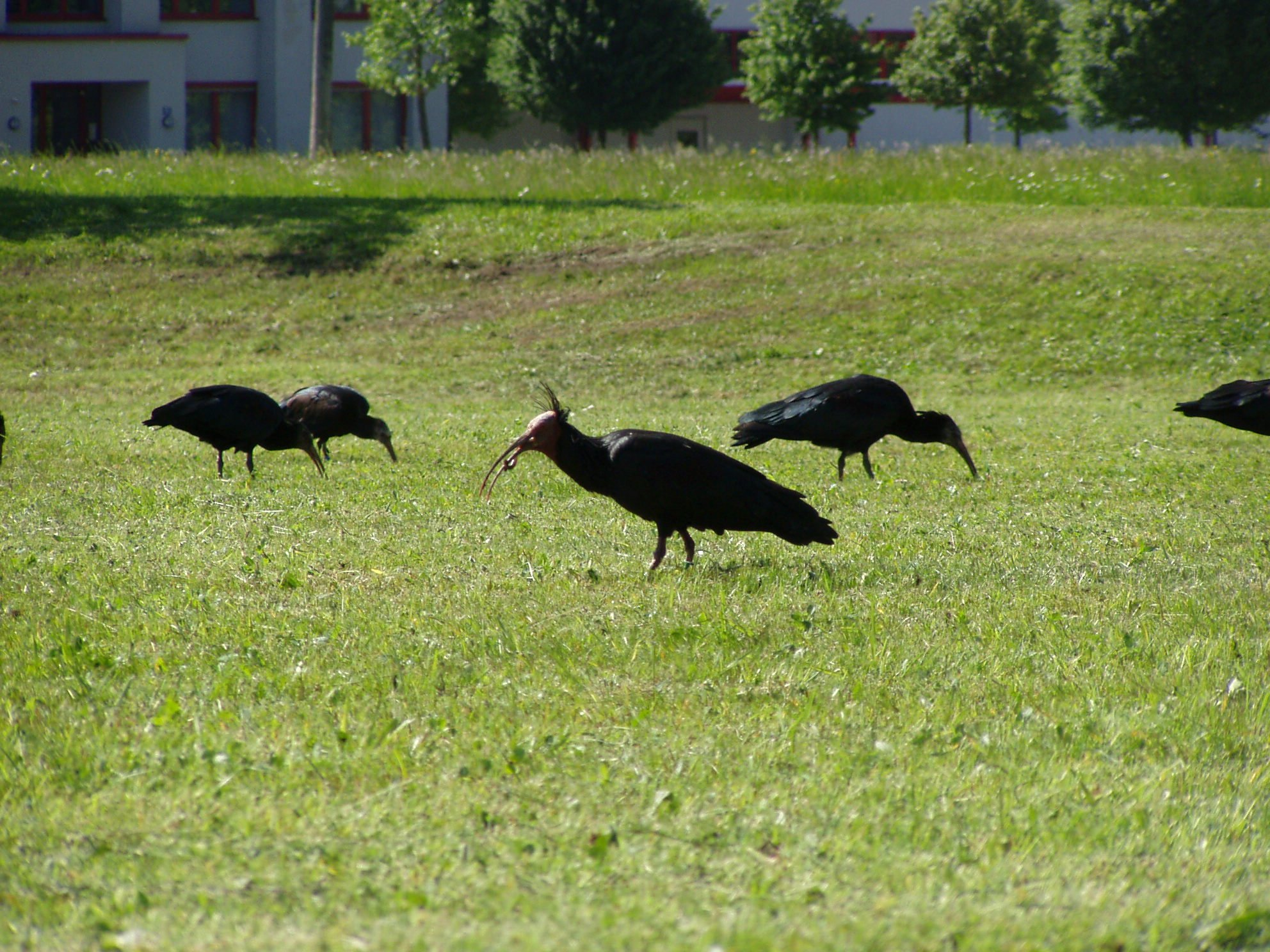 Freifliegende Waldrappe in Grünau im Almtal